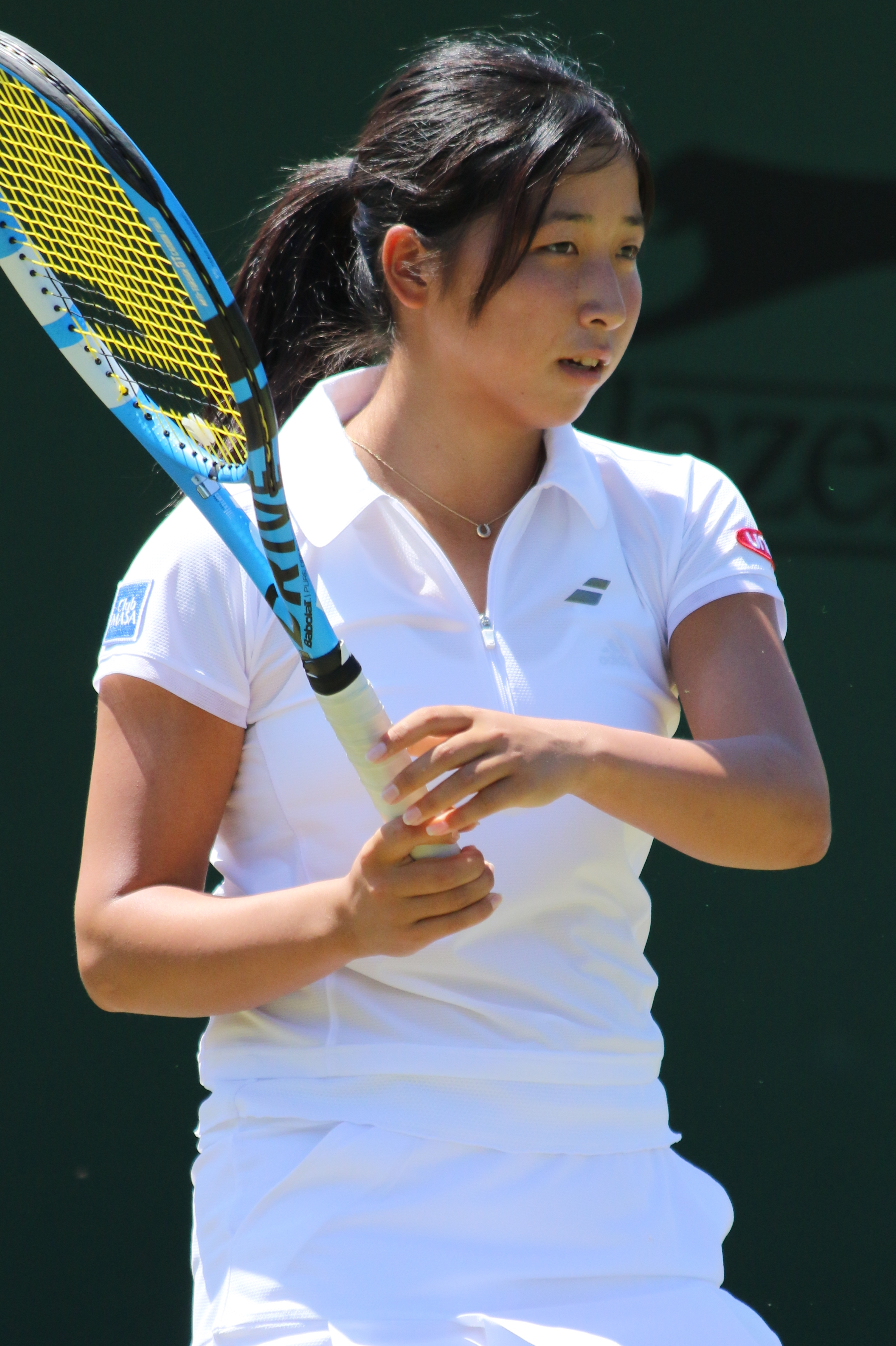 Shimizu WMQ18 (11)